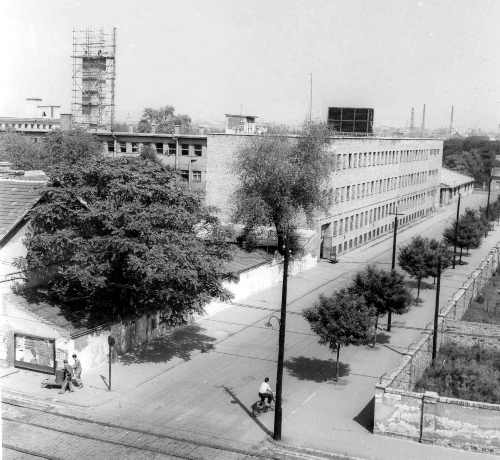 EKM gyár bővítése. Előtérben a Földváry utca